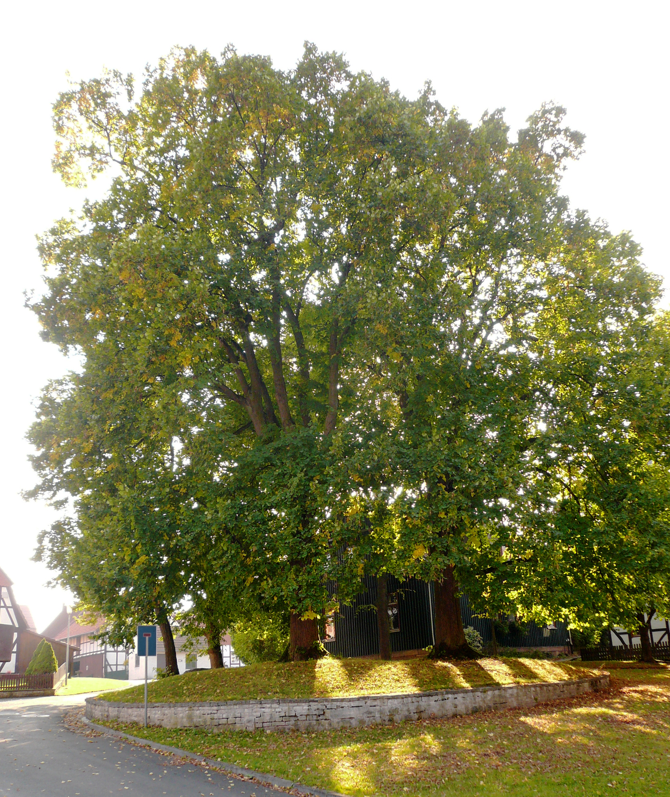 Tieplatz in Barlissen, Gemeinde Jühnde, Südniedersachsen